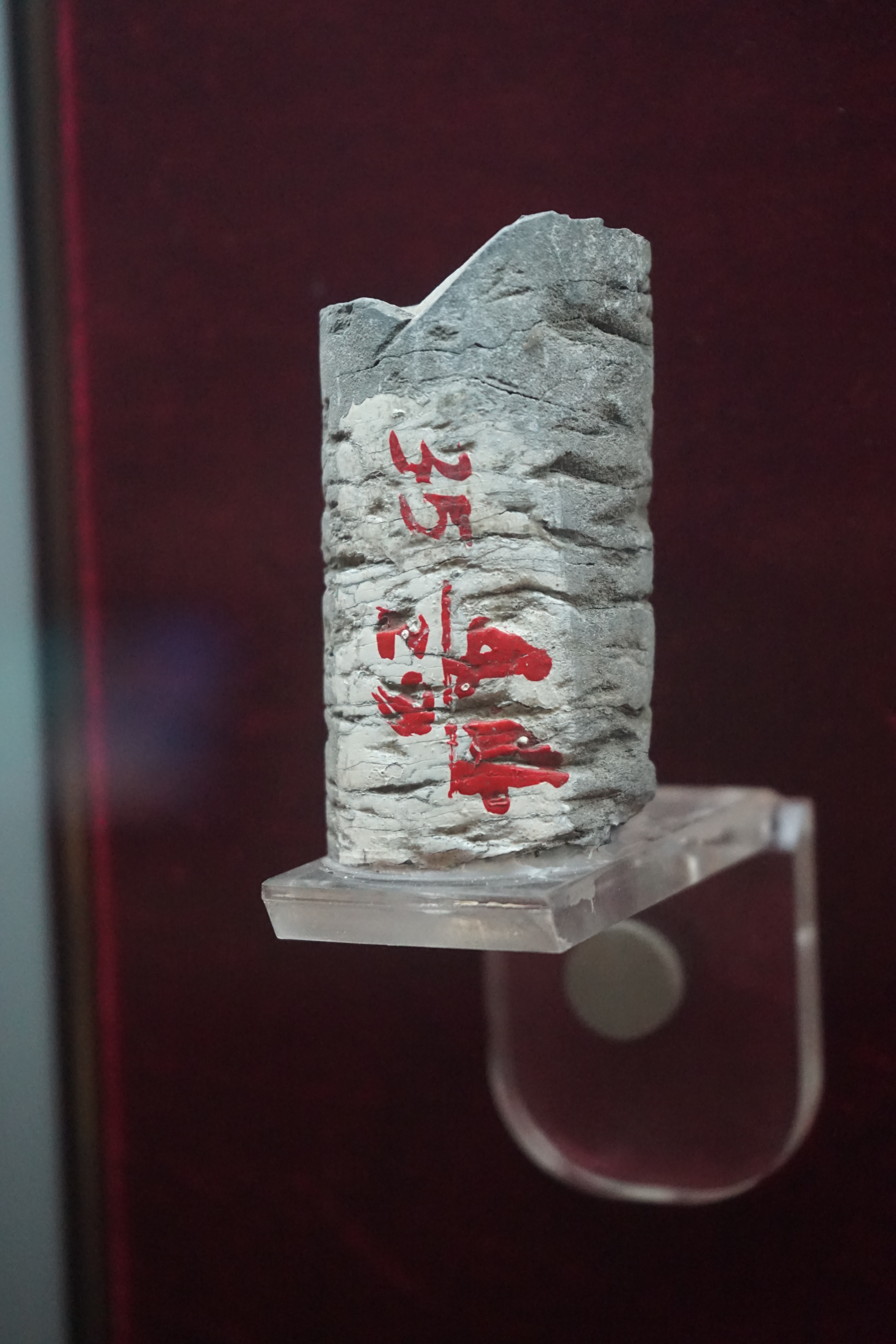 松基三井岩芯 国家一级文物